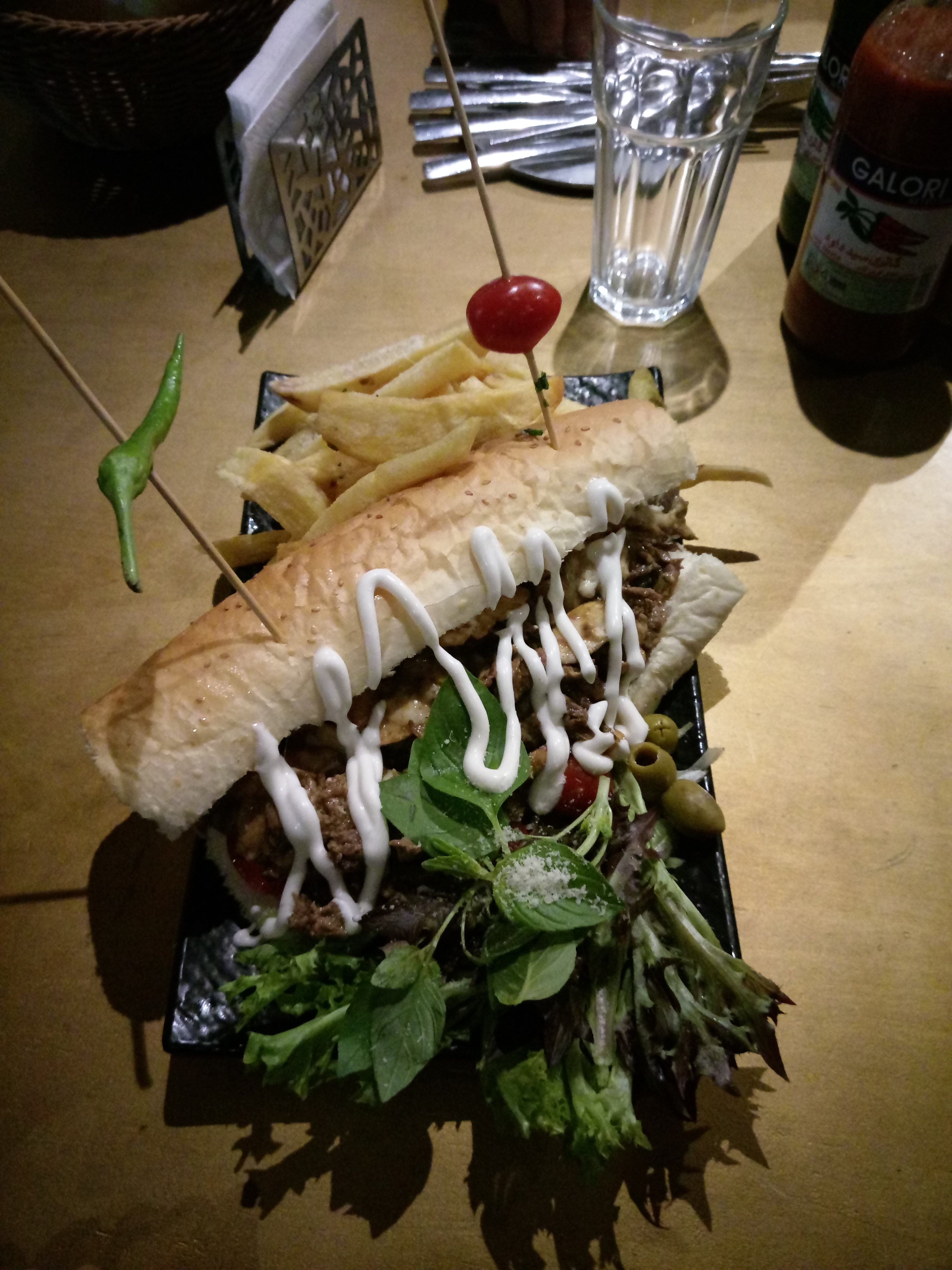 ساندویچ رست بیف